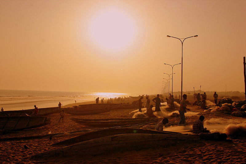 חוף פורי, אוריסה, הודו צולמה ע"י ניר נוסבאום, ינואר 2006